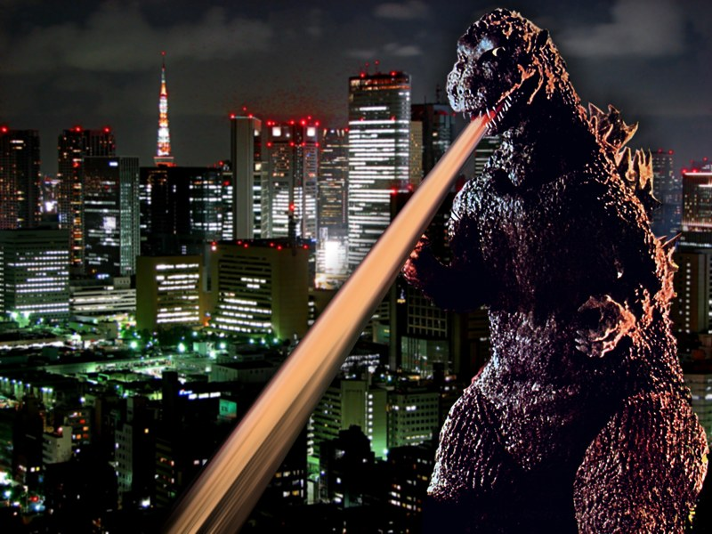 Tokyo night view